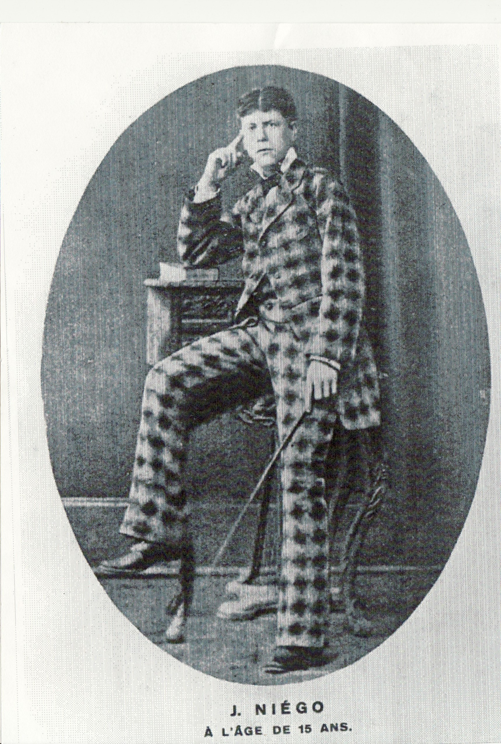 תצלום של יוסף נייגו בן 15